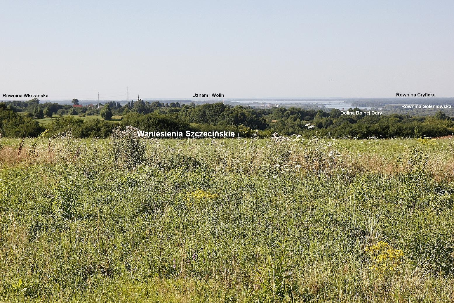 Pobrzeże Szczecińskie